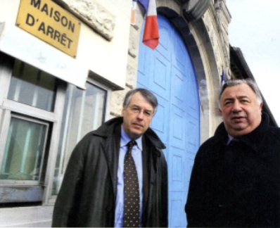 Jean-René Lecerf, rapporteur du projet de loi pénitentiaire, en compagnie de Gérard Larcher, président du Sénat, lors de la visite de la prison de Loos (Nord) au printemps 2009